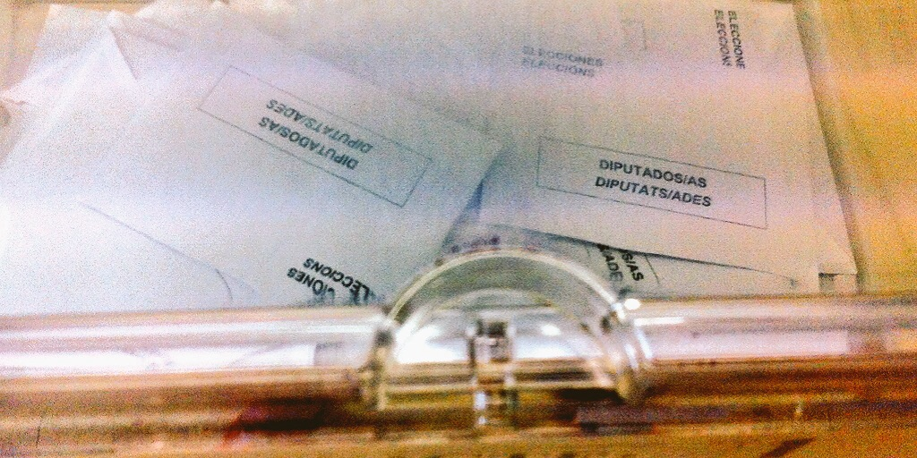 eleccions parlament de Catalunya 2015